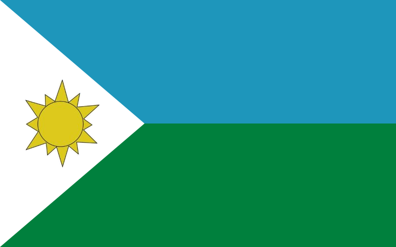 Bandera de El Chaco